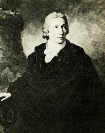 Portrait des sächsischen Staatsmannes Detlev Graf von Einsiedel.